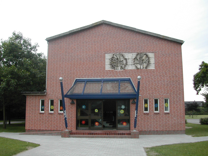 Frontansicht der Grundschule Lohe-Rickhof